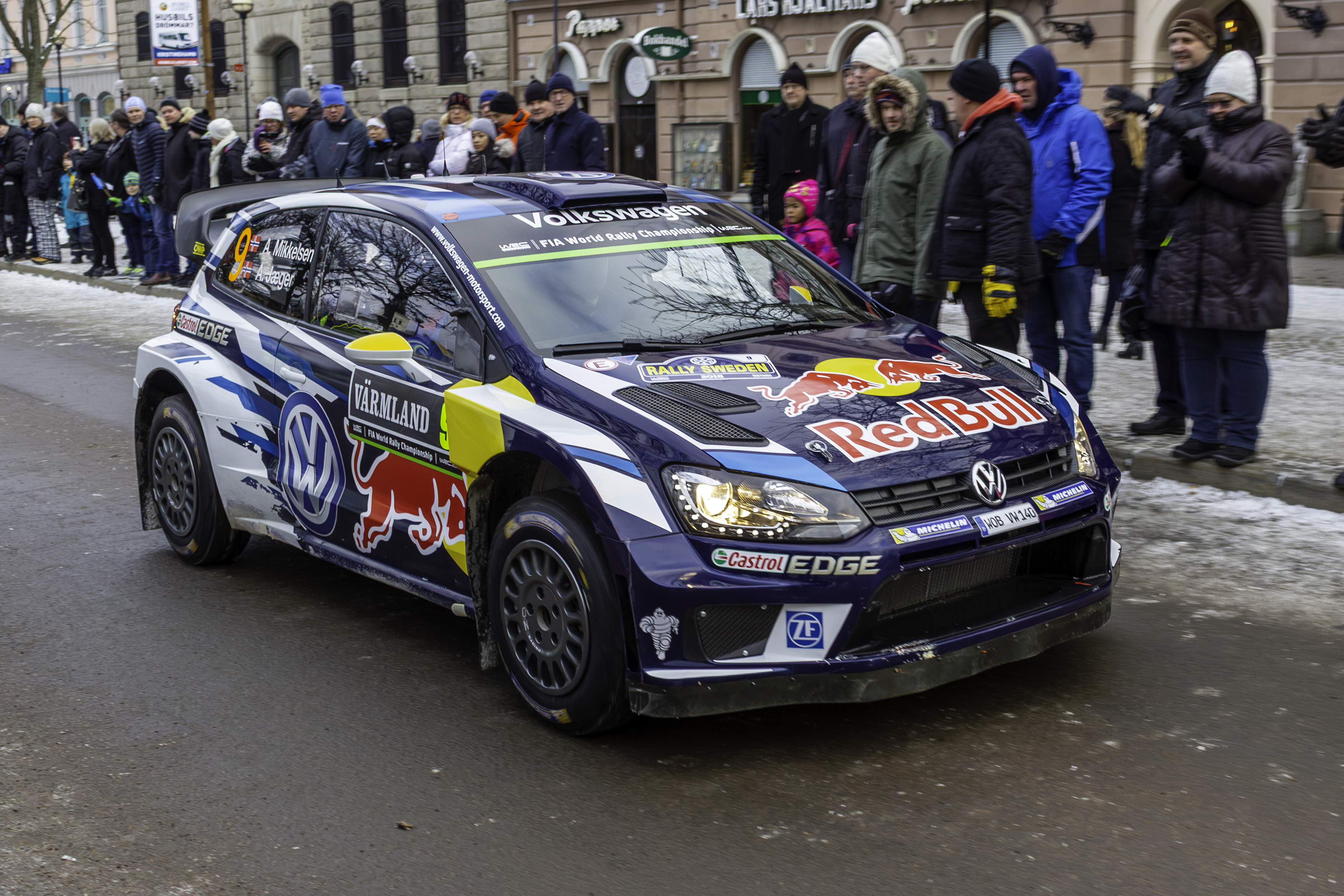 Volkswagen Polo R WRC de Andreas Mikkelsen en Karlstad durante o Ralli de Suecia 2016.